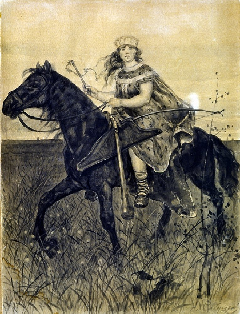 Всадница. Поленица удалая. Бумага, черная акварель. Нижегородский художественный музей, Нижний Новгород